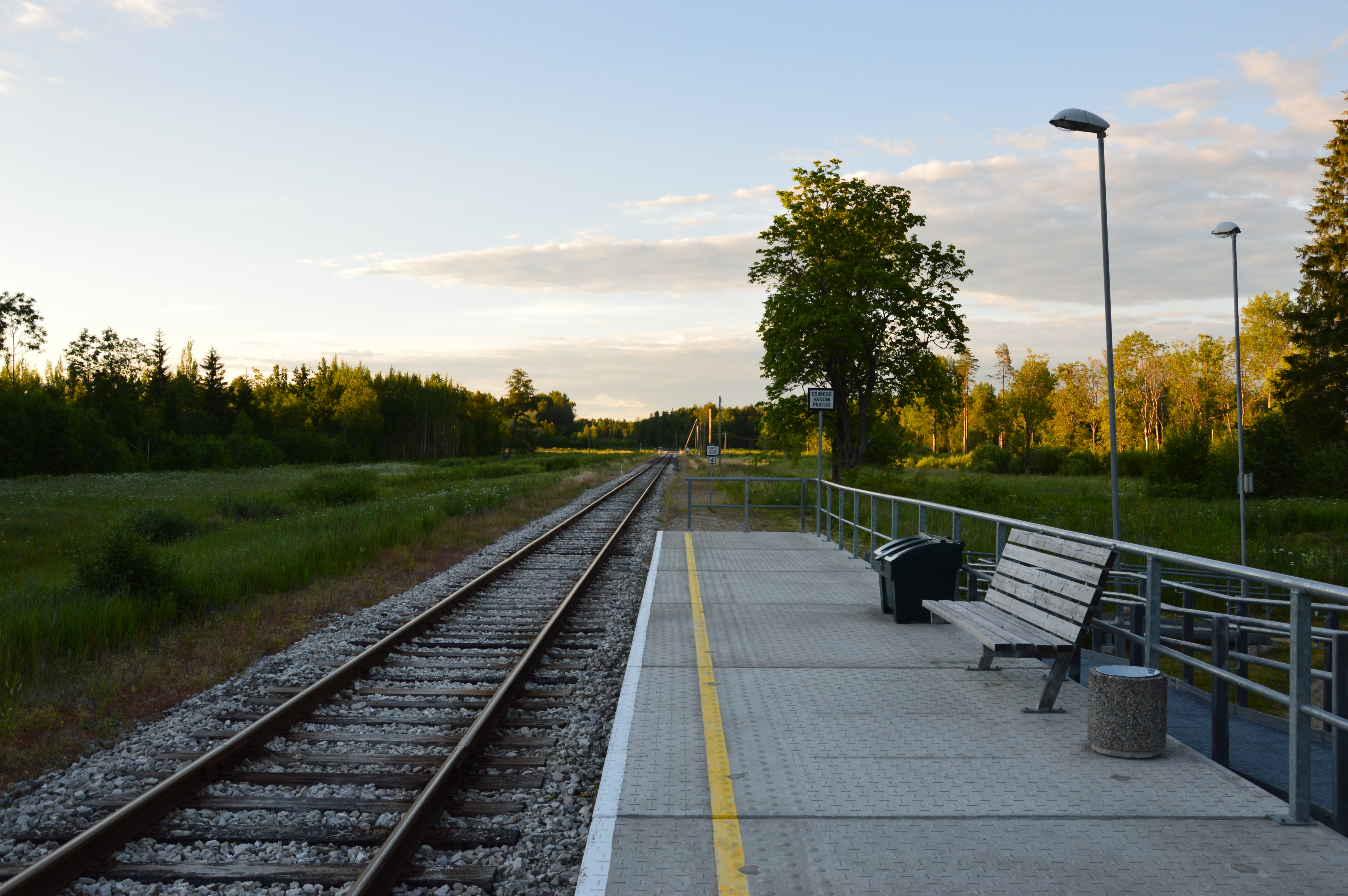 Viluvere raudteepeatus.